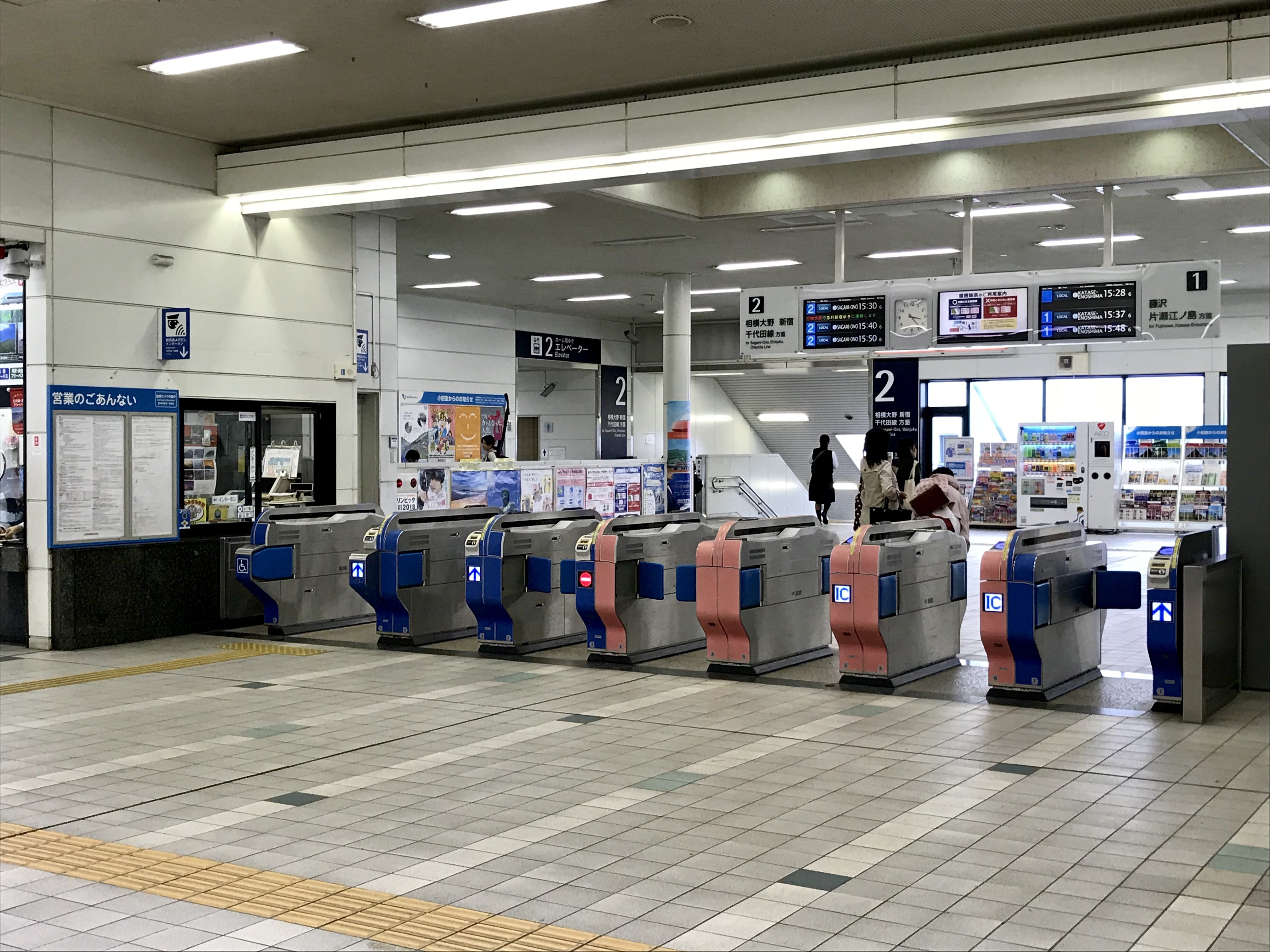 小田急江ノ島線六会日大前駅改札口